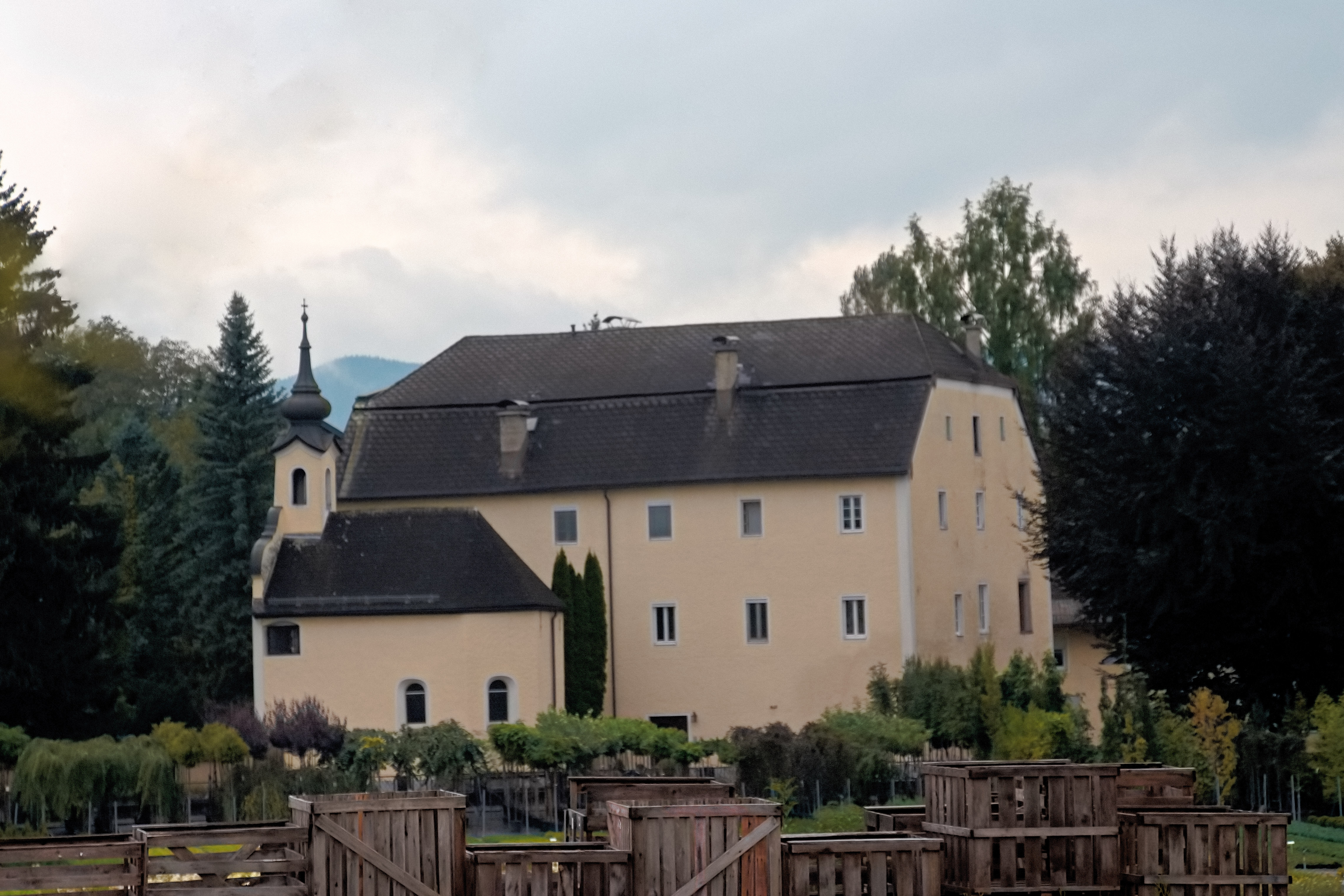 Das Schlossbauerngut mit der St. Anna-Kapelle im Salzburger Stadtteil Liefering im September; Ansicht von Nordosten.